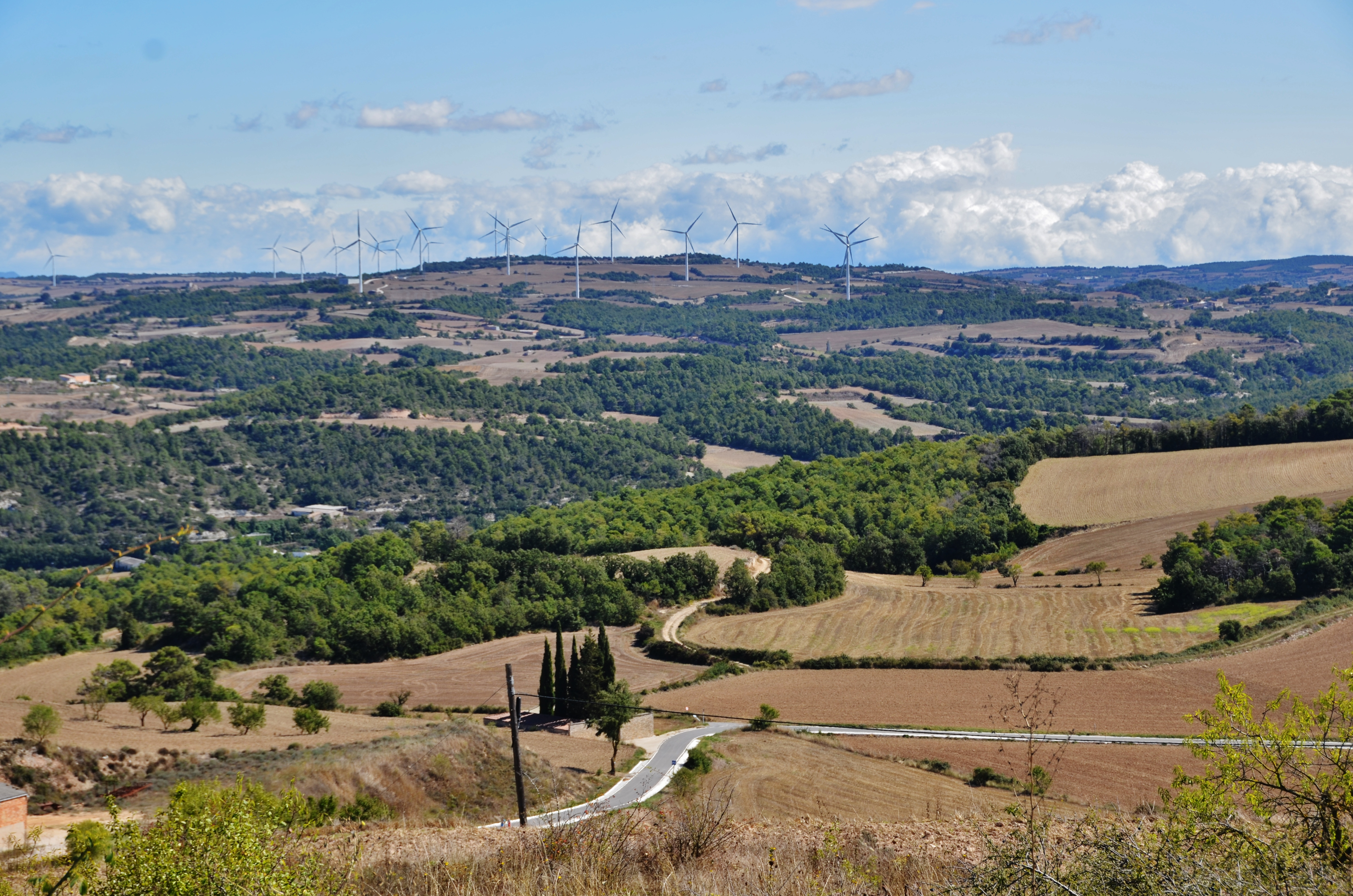 Obagues del Riu Corb This is a a photo of a natural area in Catalonia, Spain, with id: ES510148